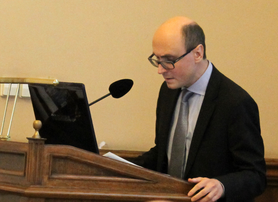 А.В.Рыков во время выступления на международной конференции "Актуальные проблемы теории и истории искусства", 2014